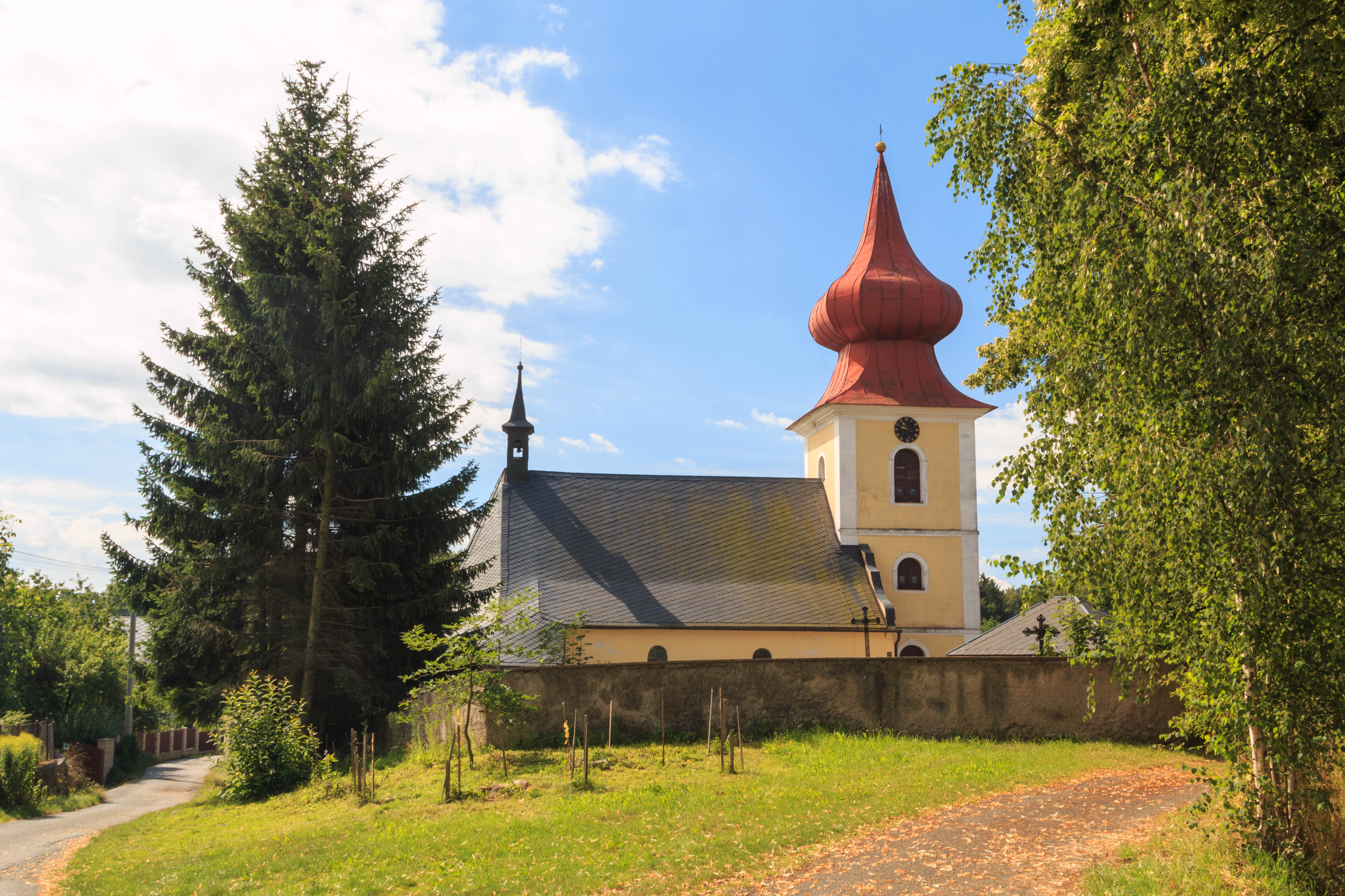 Kostel svatého Mikuláše, uprostřed návsi, Skuhrov (okres Havlíčkův Brod).